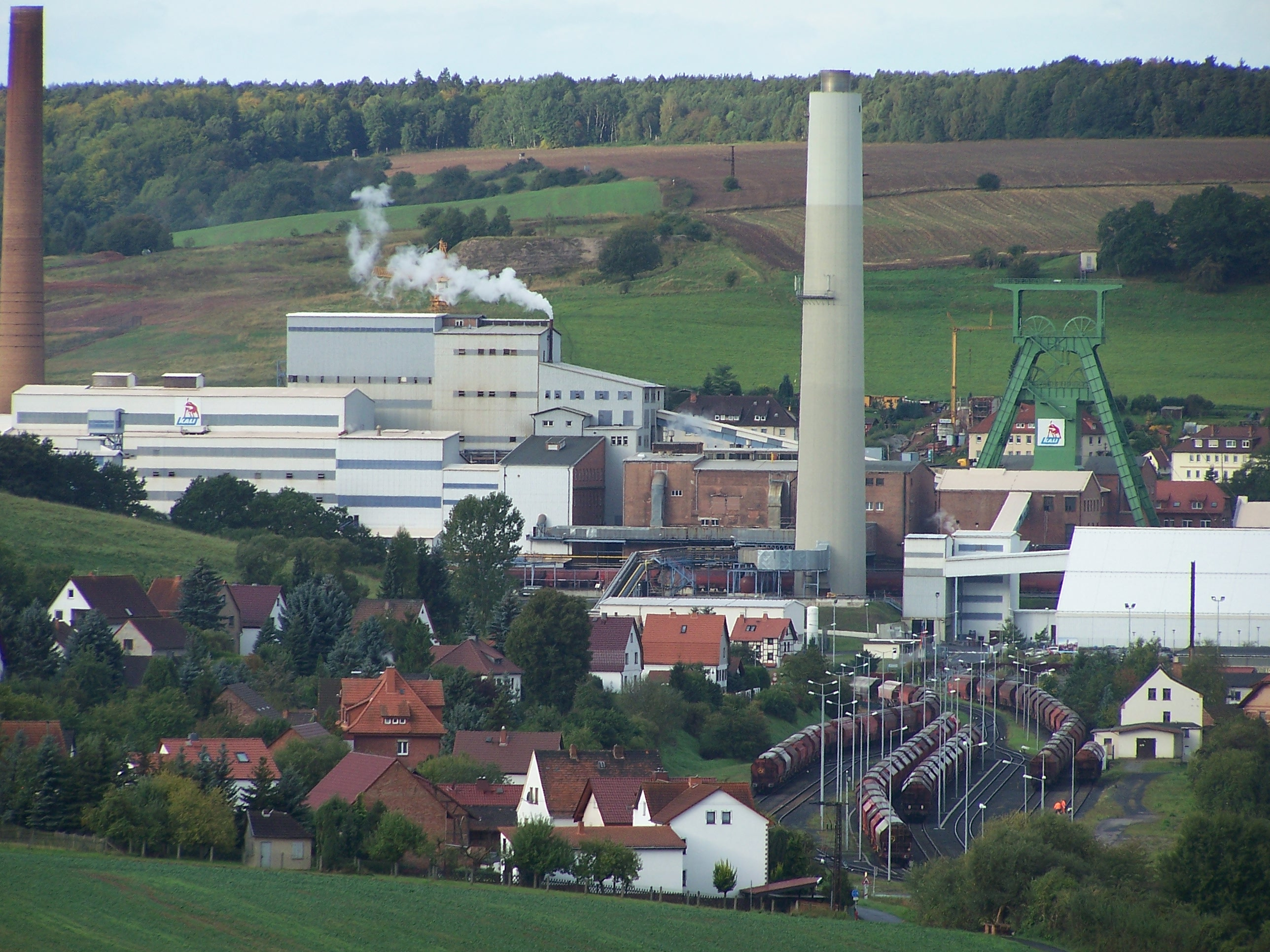 Ansichten des Kaliwerks Unterbreizbach.